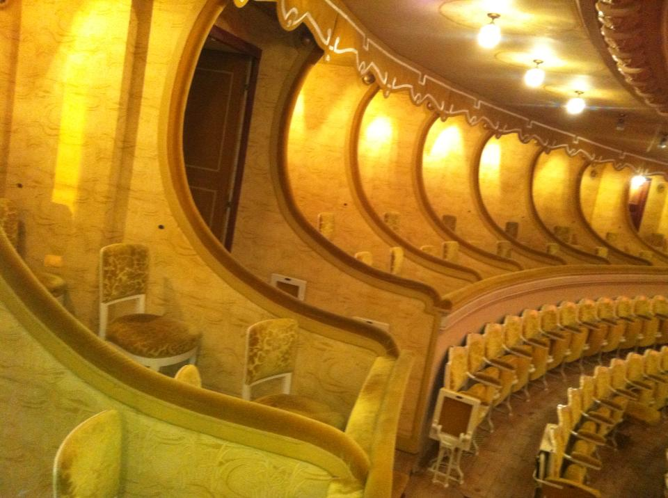 les cabines familiales privé de l'Opéra de Vichy.